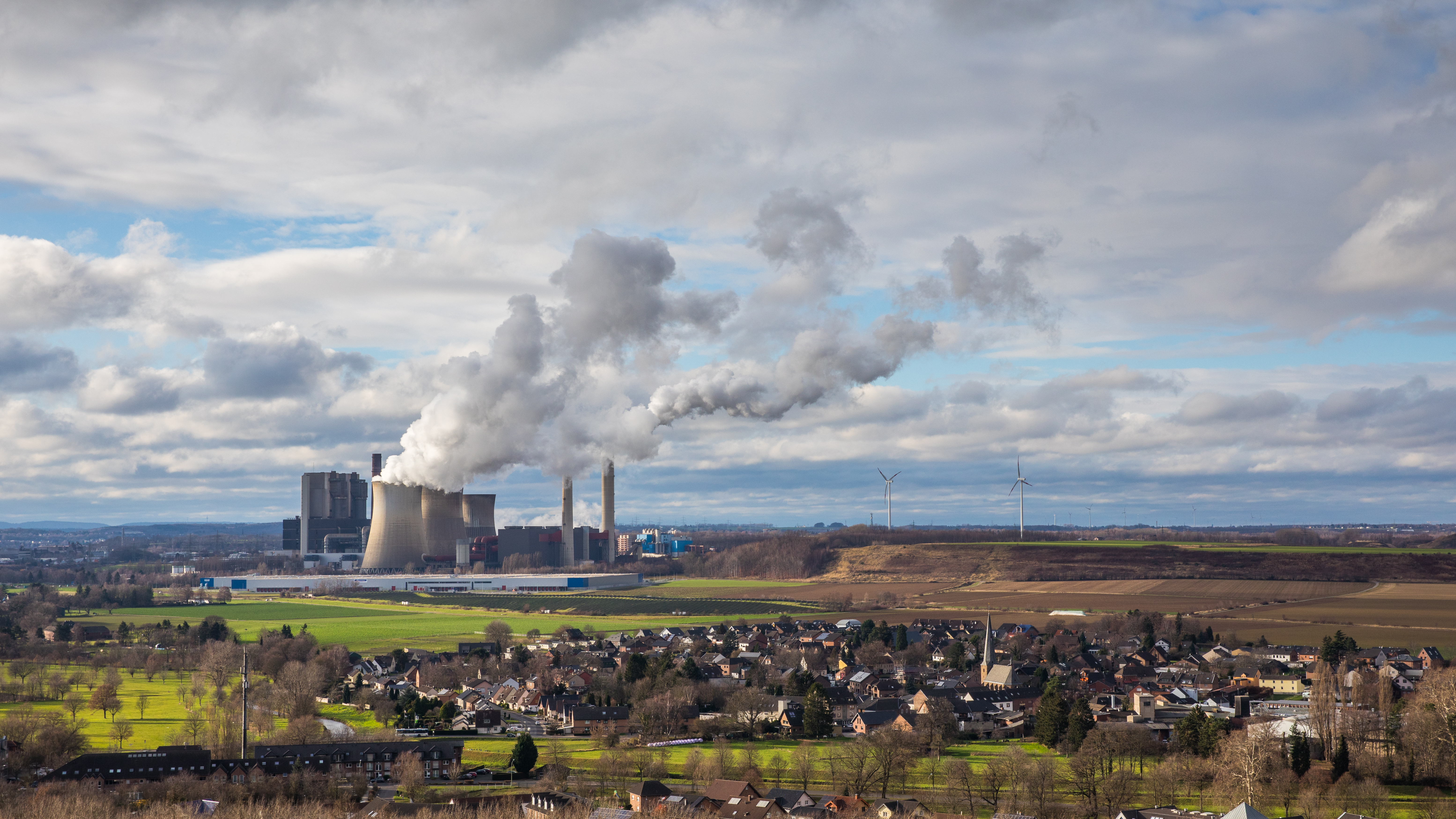 Lamersdorf und Kraftwerk Weisweiler. Aufnahmestandort: Indemann